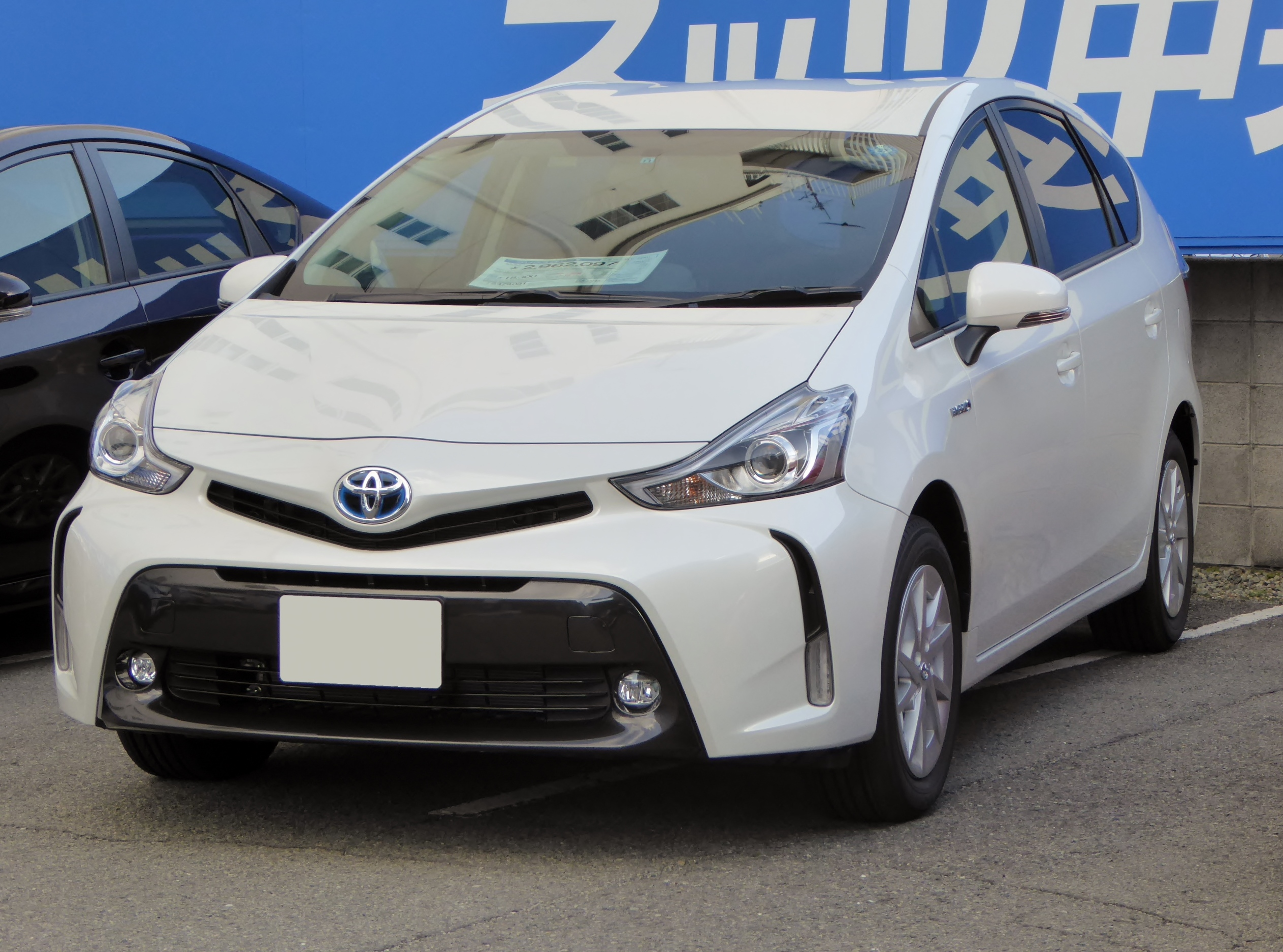 ZVW40型トヨタ・プリウスα G"Touring Selection"をフロントから撮影。